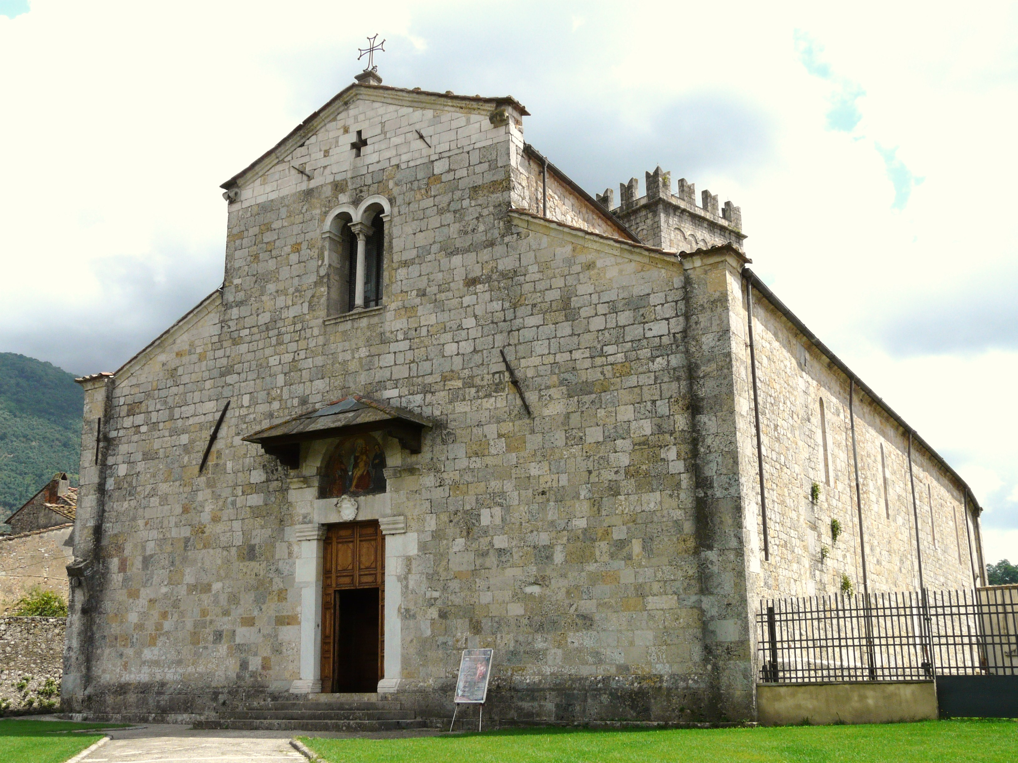 Complesso della badia di San Pietro, Camaiore, Toscana, Italia